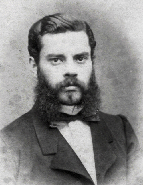 Gregorio Ignacio Gavier.